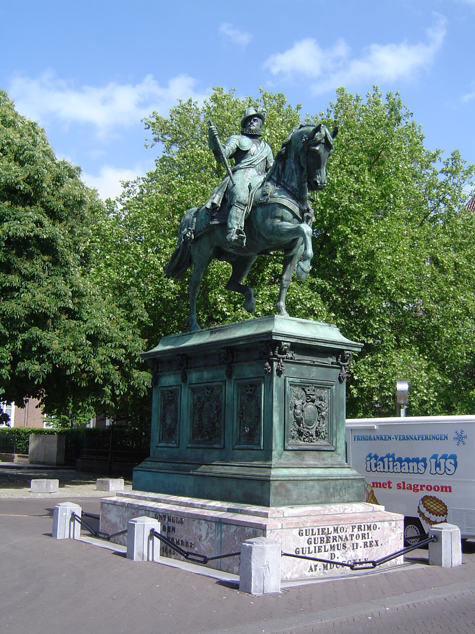 Ruiterstandbeeld Willem I, Noordeinde, The Hague, Holland